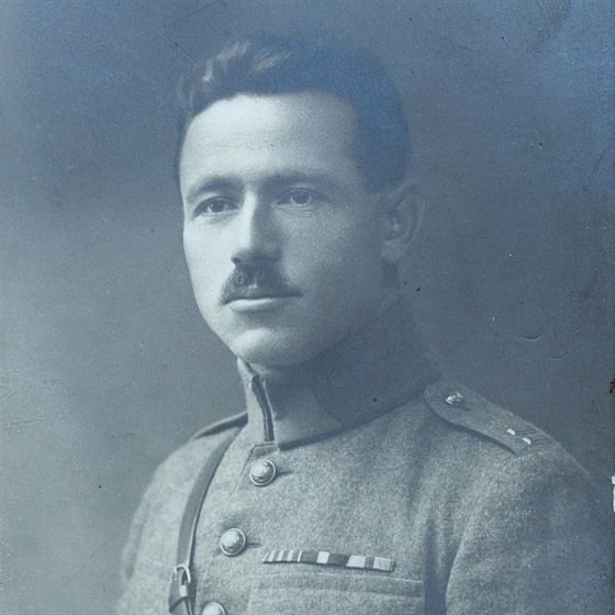 František Fanta, československý legionář, generálmajor československé armády